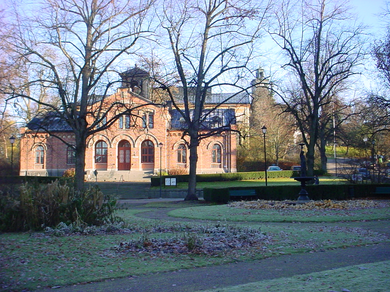 Afzeliiplan i Enköping med Tingshuset närmast i bakgrunden.